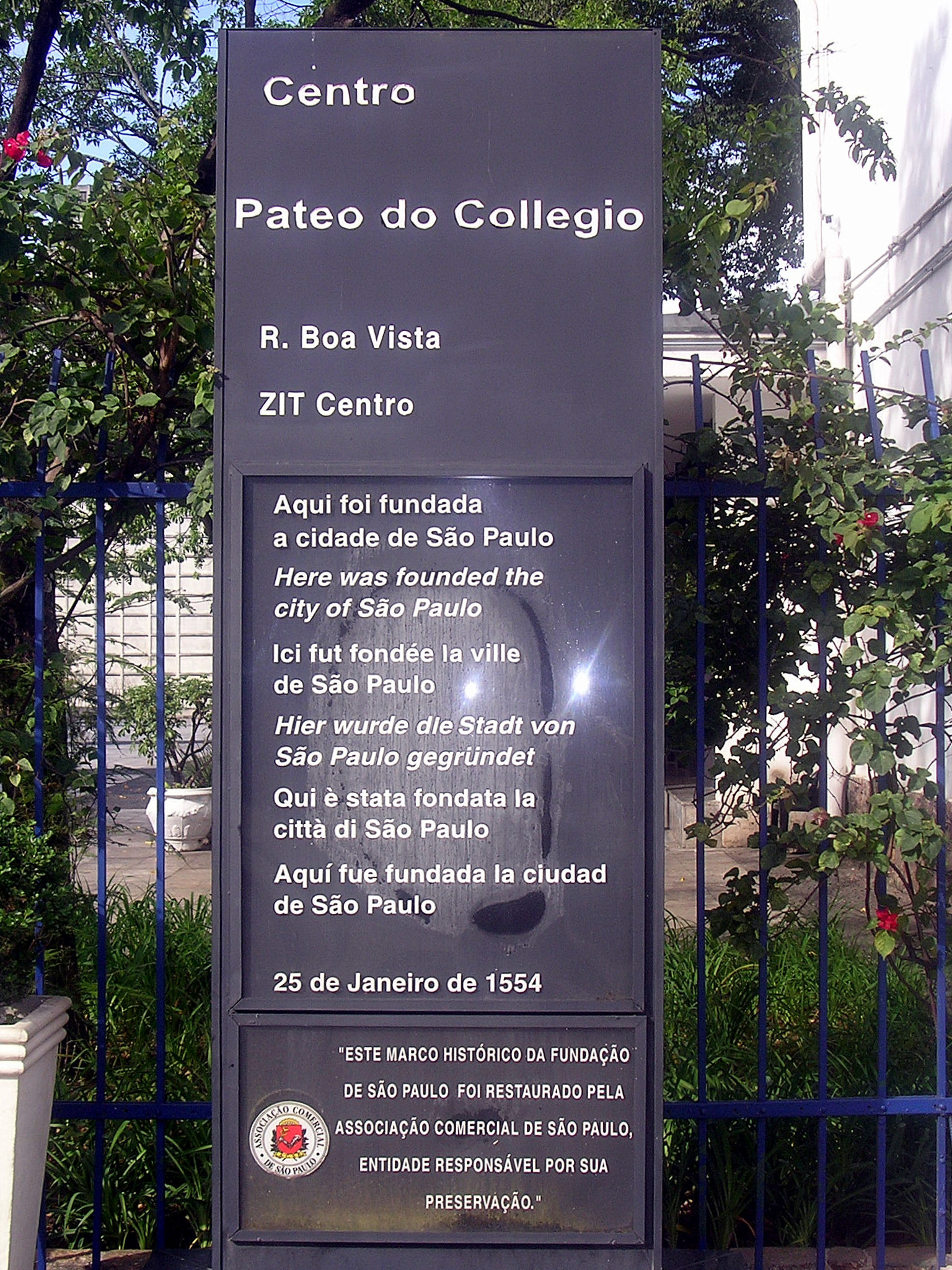 Pátio do Colégio, à Sao Paulo, au Brésil. Enseigne d'information (date de création de la ville, le 25 janvier 1554)